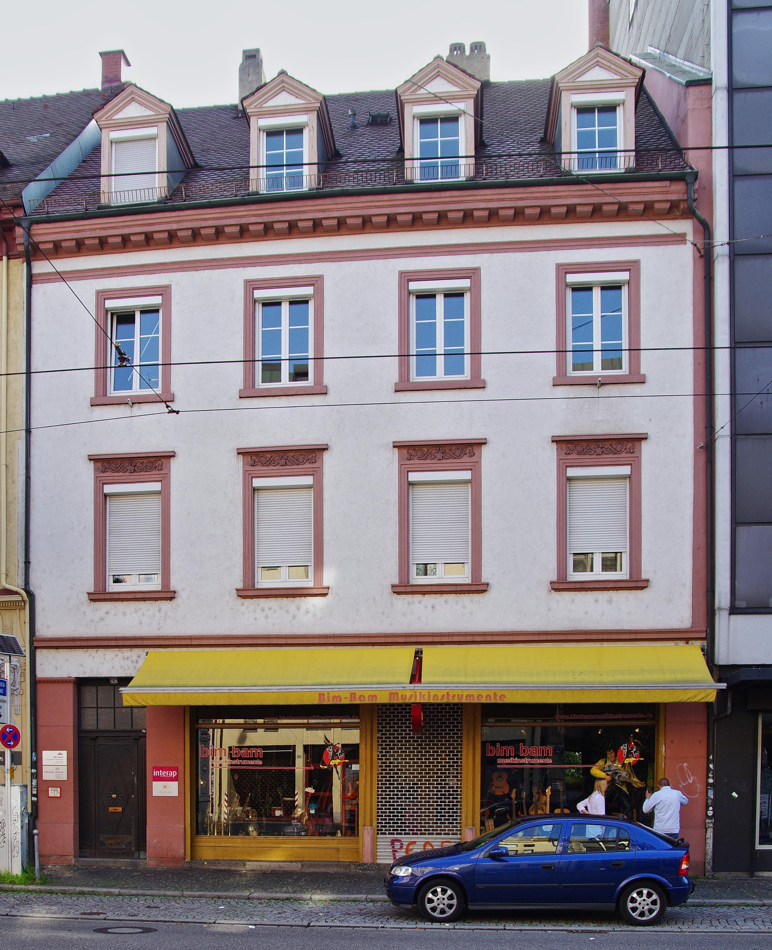 Das Gebäude in der Kaiser-Joseph-Straße 267, hier war der Sitz des Centaurus Verlags